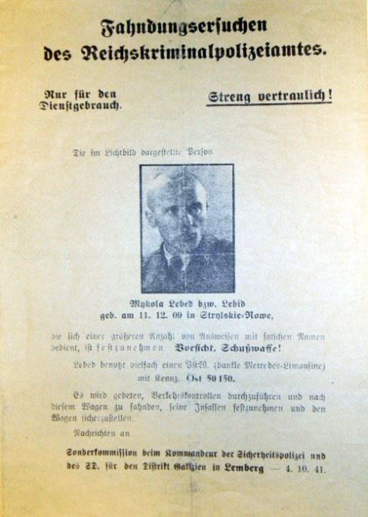 Гестаповская листовка о розыске Николая Лебедя из Гарвардского архива